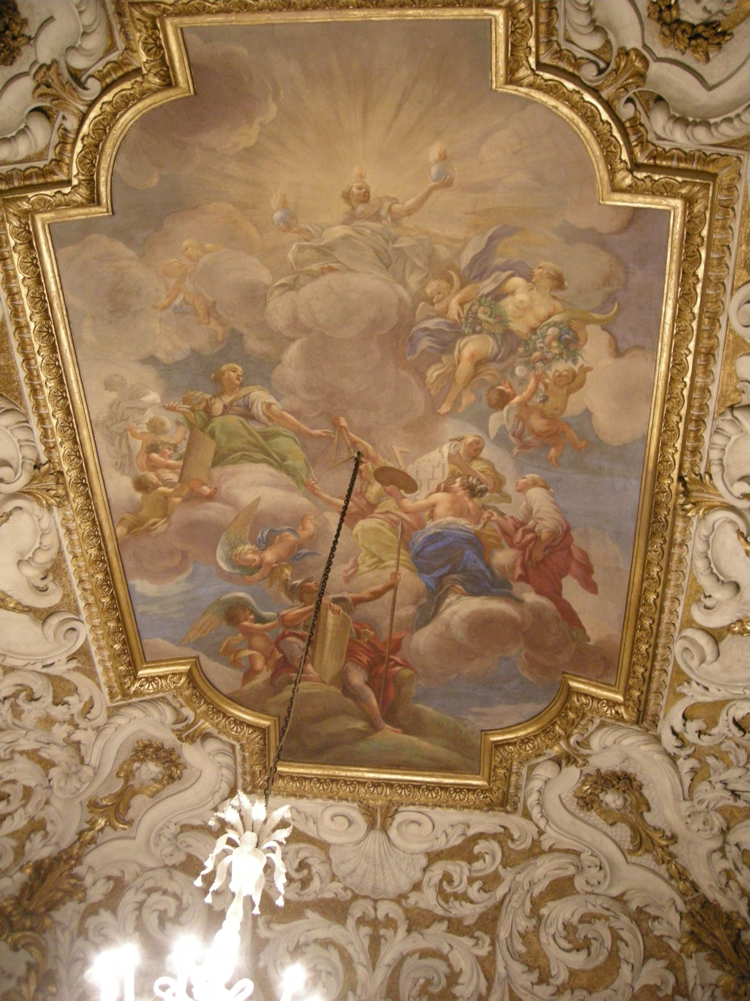 Palazzo medici riccardi, sala del trionfo delle belle arti, di anton domenico gabbiani